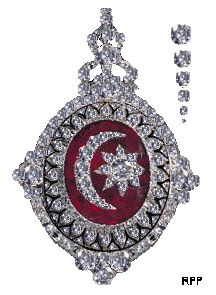 Juweel van de orde